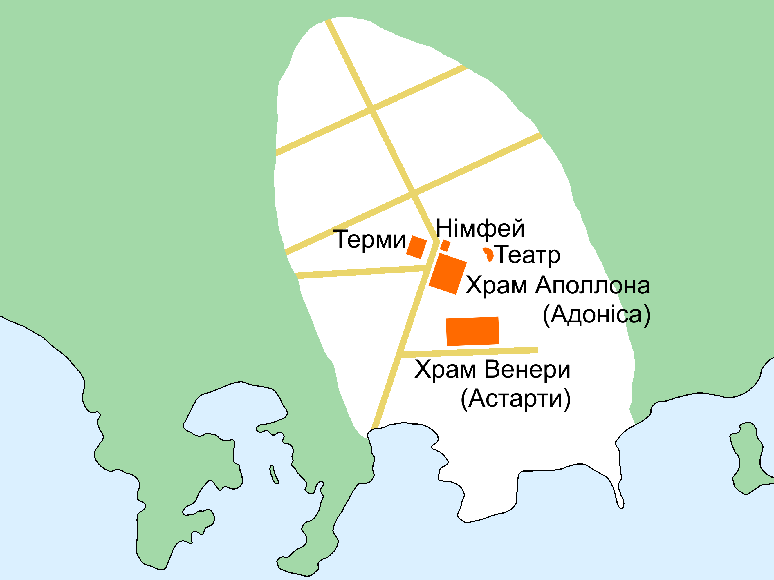 Карта города Библа в римские времена